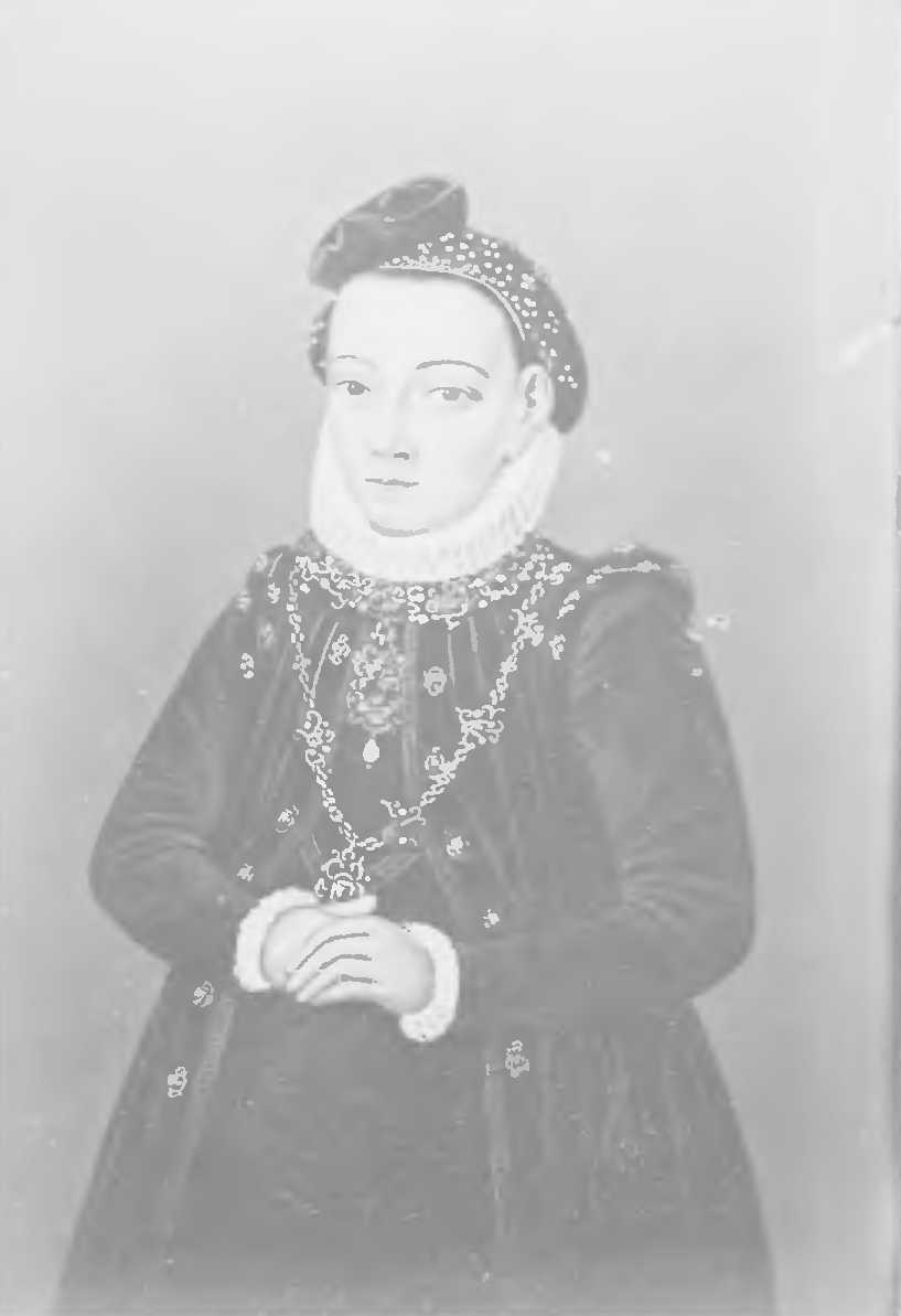 Jadwiga Jagiellonka (1513–1573)